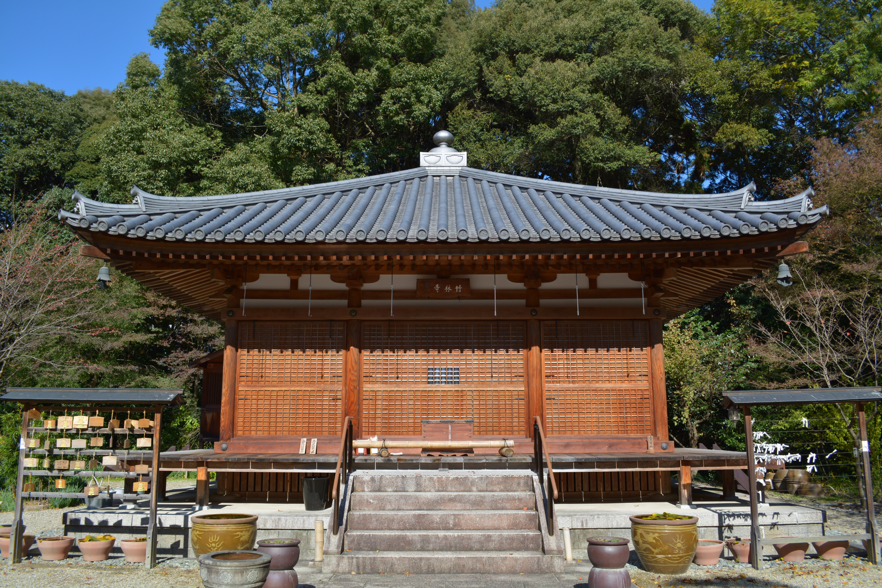 奈良県生駒市有里にある古刹竹林寺。行基が眠る。